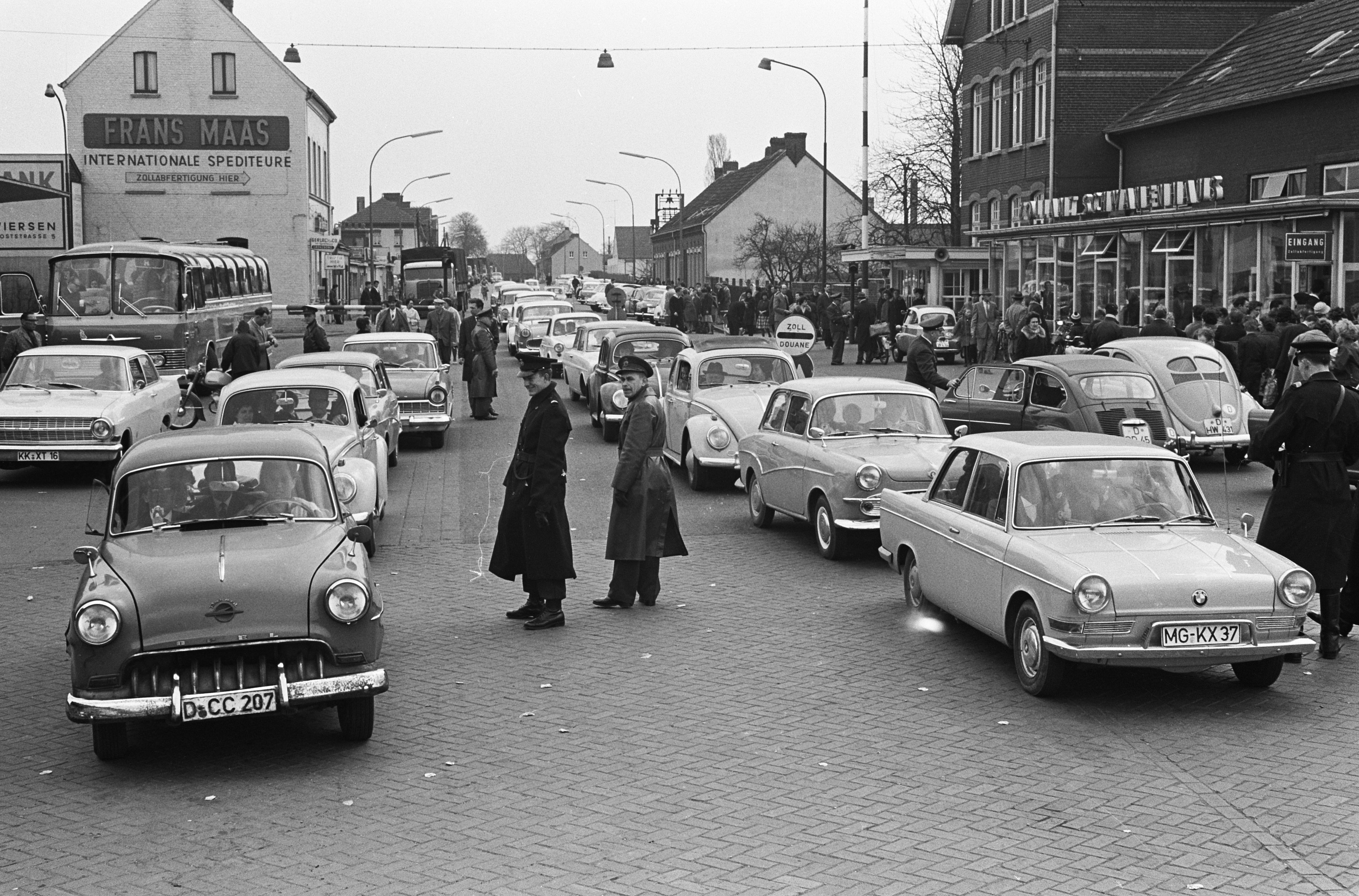 Collectie / Archief : Fotocollectie Anefo Reportage / Serie : [ onbekend ] Beschrijving : Grensdrukte bij Venlo, Duitse huismoeders doen inkopen in Venlo Datum : 12 april 1963 Locatie : Limburg, Venlo Trefwoorden : auto's Fotograaf : Pot, Harry / Anefo Auteursrechthebbende : Nationaal Archief Materiaalsoort : Negatief (zwart/wit) Nummer archiefinventaris : bekijk toegang 2.24.01.05 Bestanddeelnummer : 915-0389